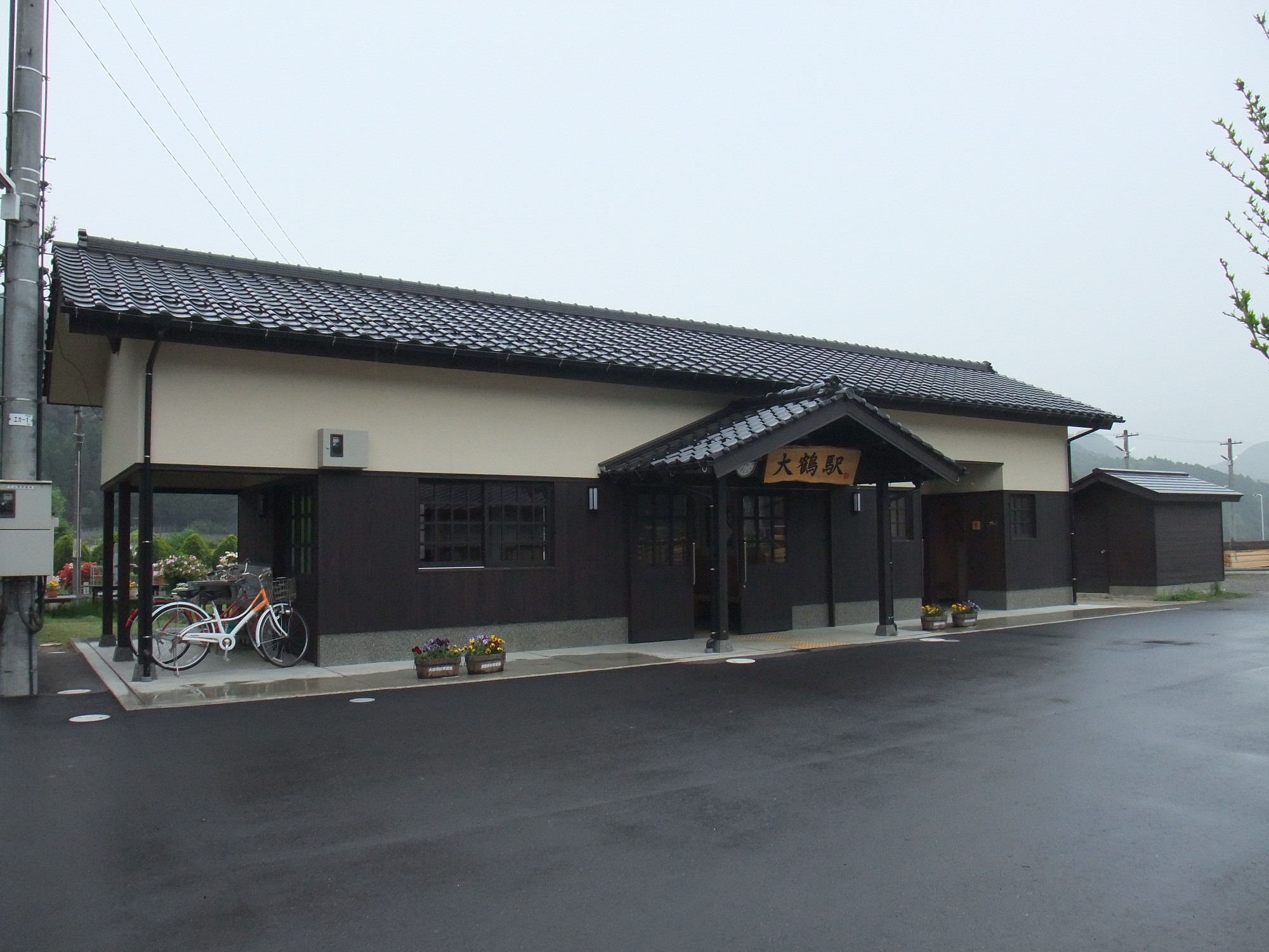 大鶴駅（2011/05/03）